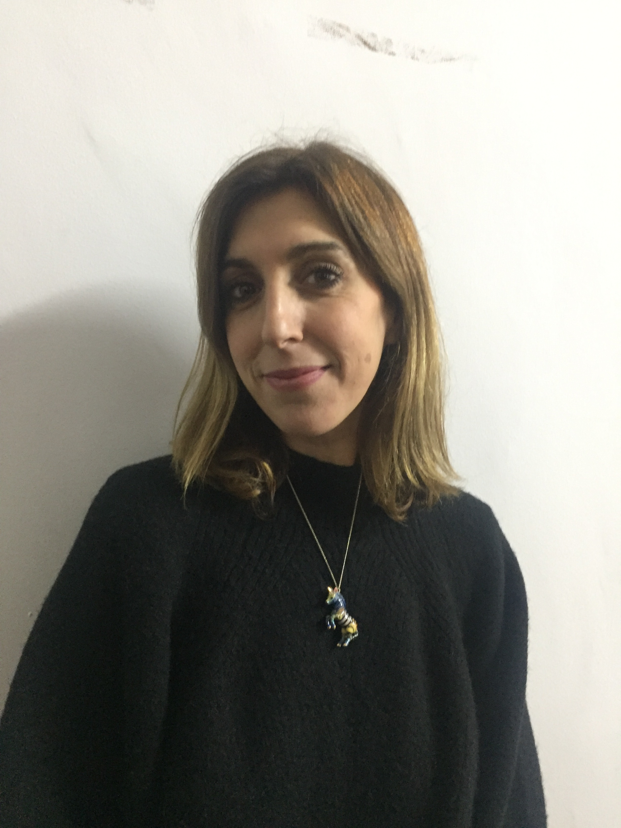 En La Casa Encendida de Madrid